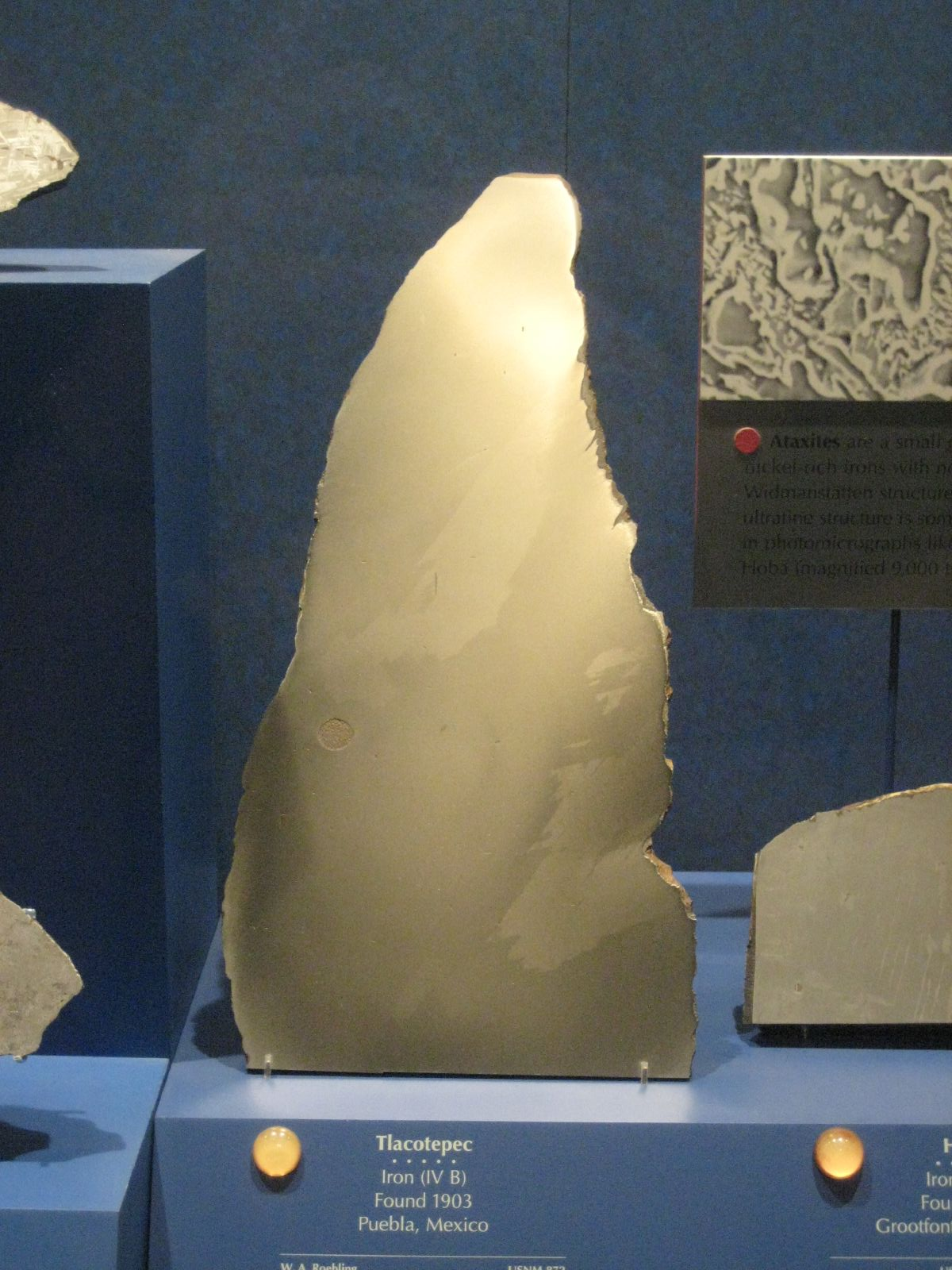 Tlacotepec meteorite, iron IVB. Found 1903, Puebla, Mexico.